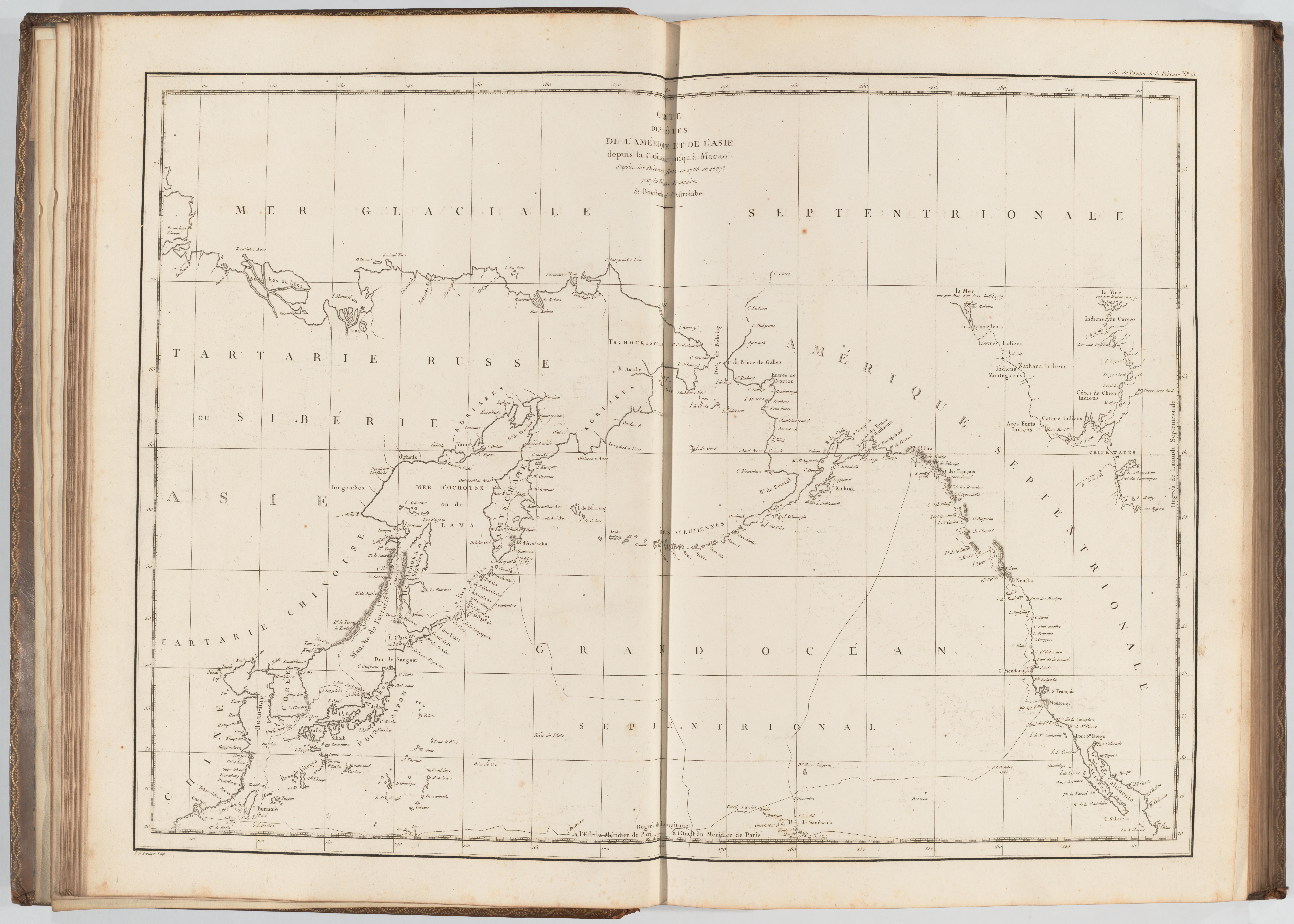 Voyage de La Pérouse autour du monde /publié conformément au décret du 22 avril 1791, et rédigé par L.A. Milet-Mureau.